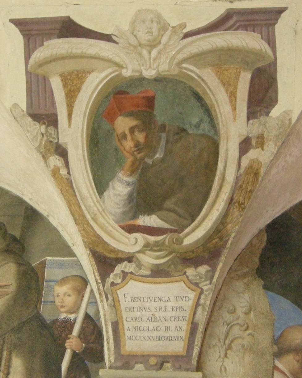 Chiostro di ognissanti, personalità francescane 07 Bentivegna de Bentivenghi